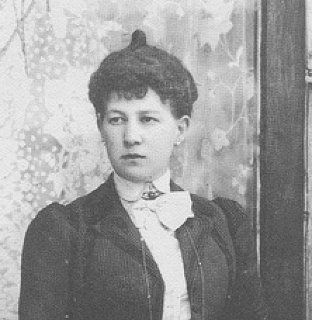 Princesa Maria da Grécia